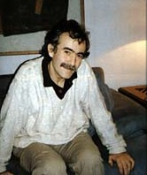 Joxemi Zumalabe kazetaria